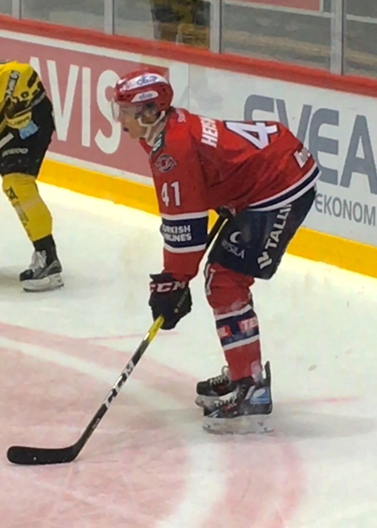 Jääkiekkoilija Miro Heiskanen edustamassa Helsingin IFK:ta 13. lokakuuta 2016 ottelussa HIFK–SaiPa.